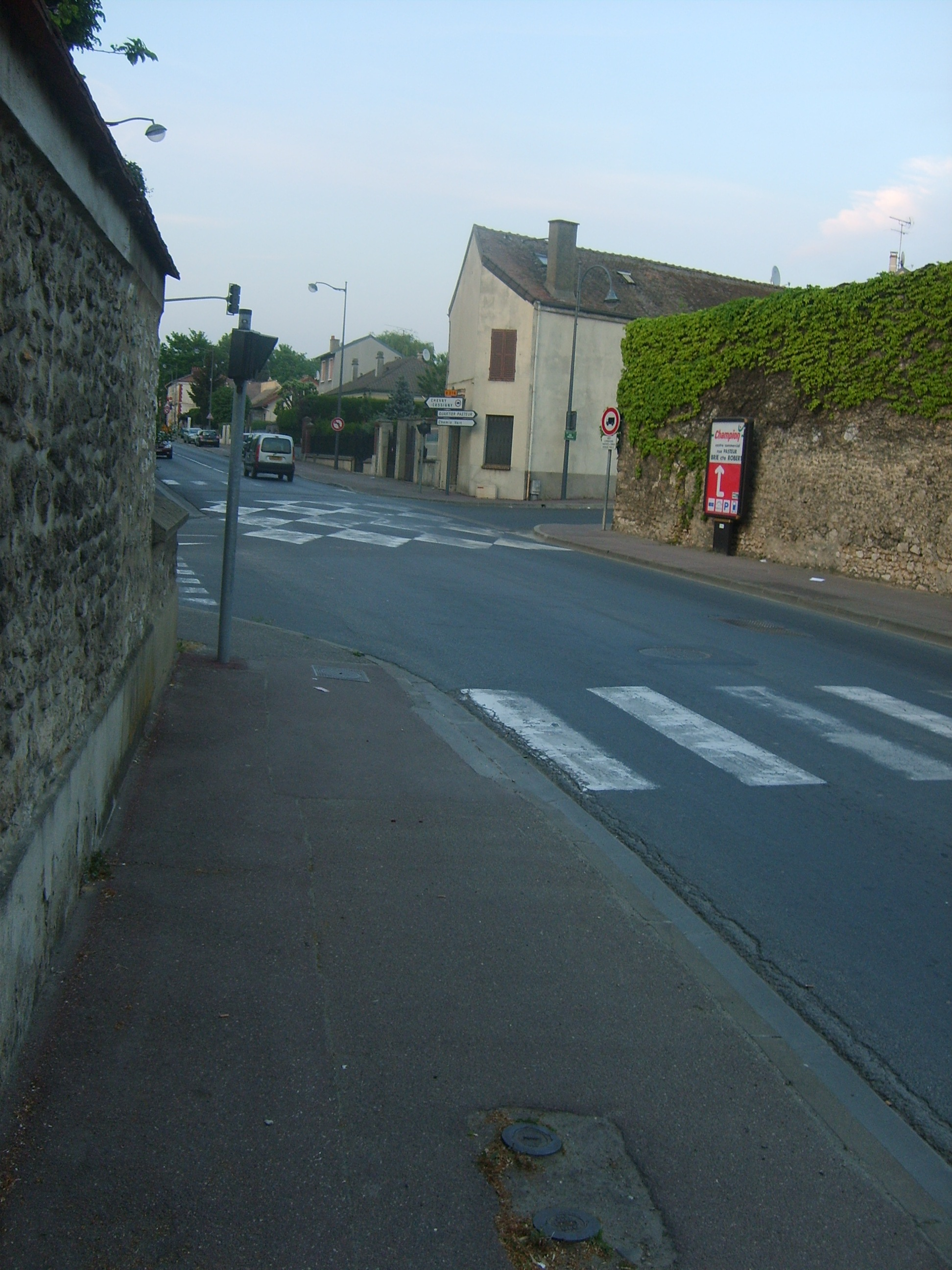 Je suis l'auteur de la photo, 77bcr77, Route en direction de chevry-cossigny